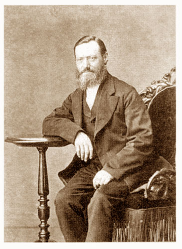 Henderikadius Zwantinus Kloekers (1828-1893).